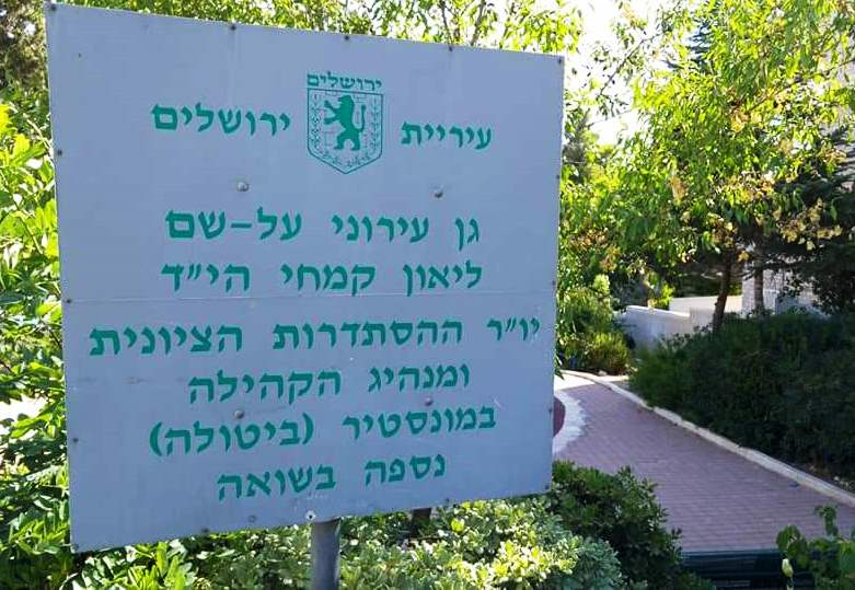 גן עירוני על שם לאון קמחי יו"ר קהילת ביטולה ברחוב הברון הירש בקריית משה בירושלים